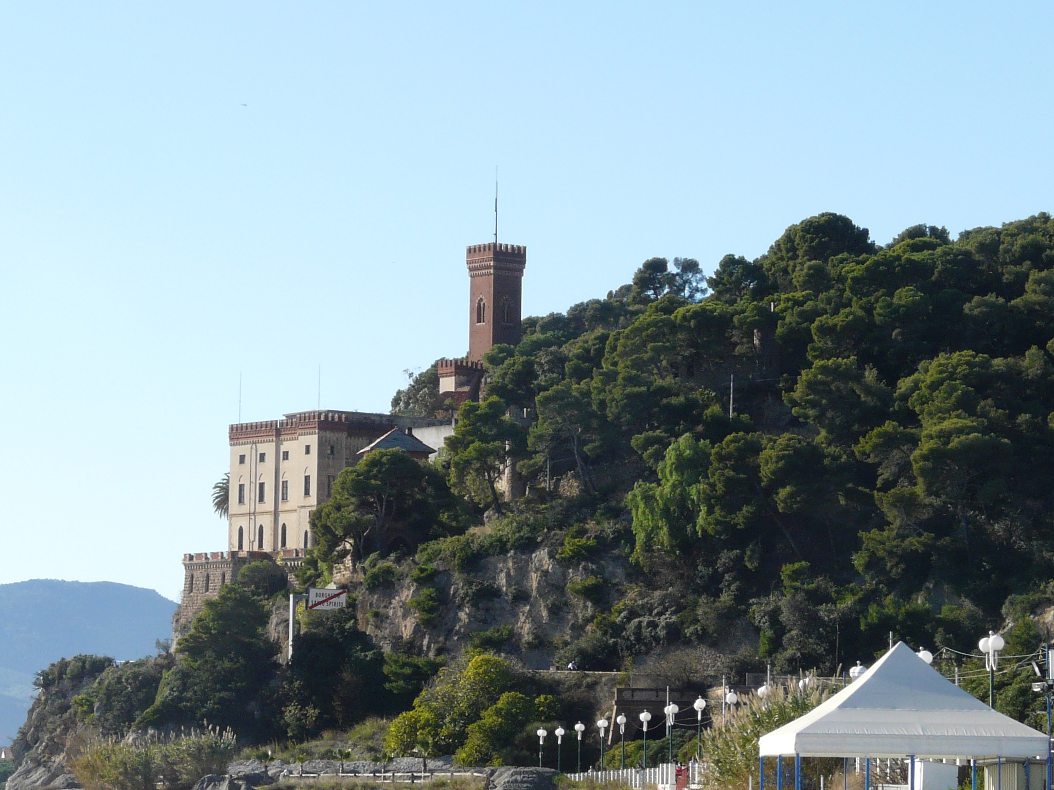 Castello Borelli, Borghetto Santo Spirito, Liguria, Italia